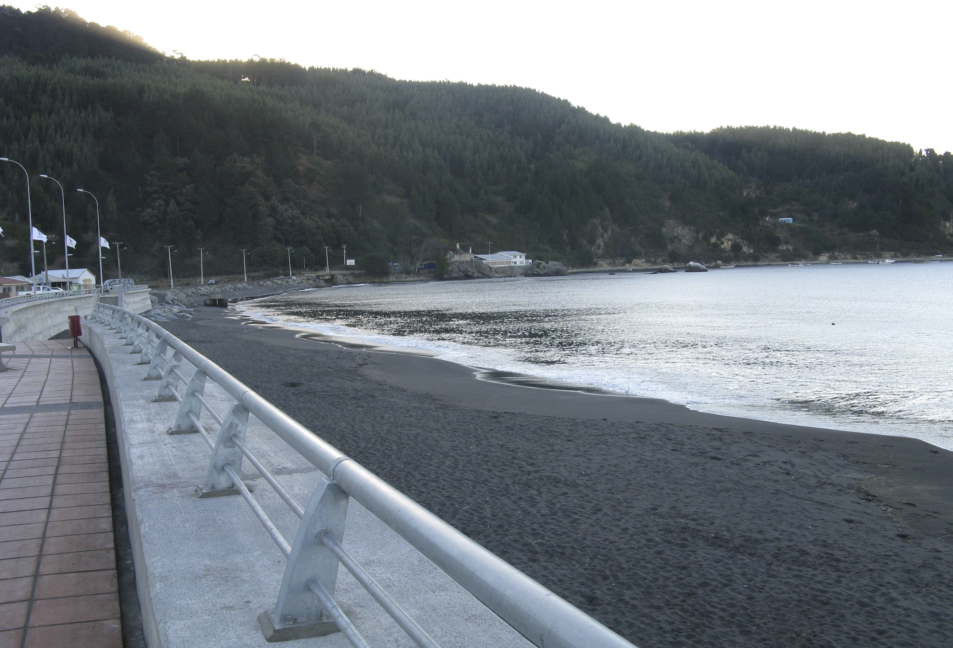 Costanera de Caleta Lenga, comuna de Hualpén Gran Concepción, VIII Región del Biobío, Chile Abril de 2008